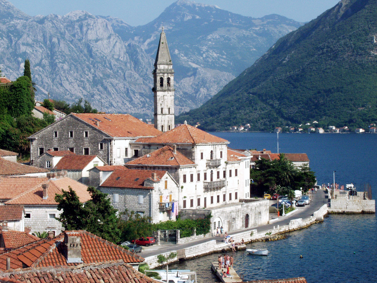 Perast, Montenegro.